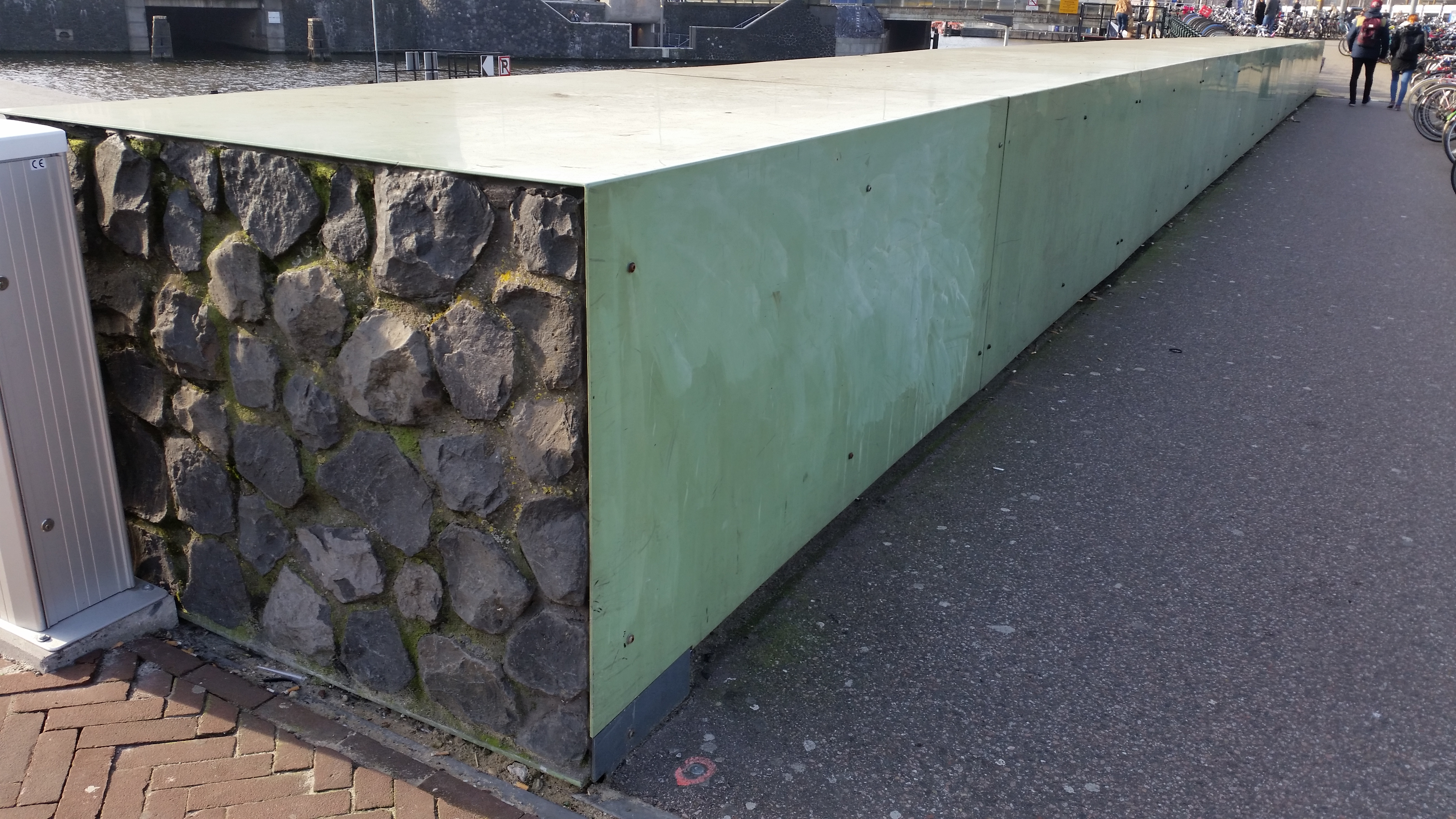 Zuidelijke leuning van Brug 228 (in Amsterdam)